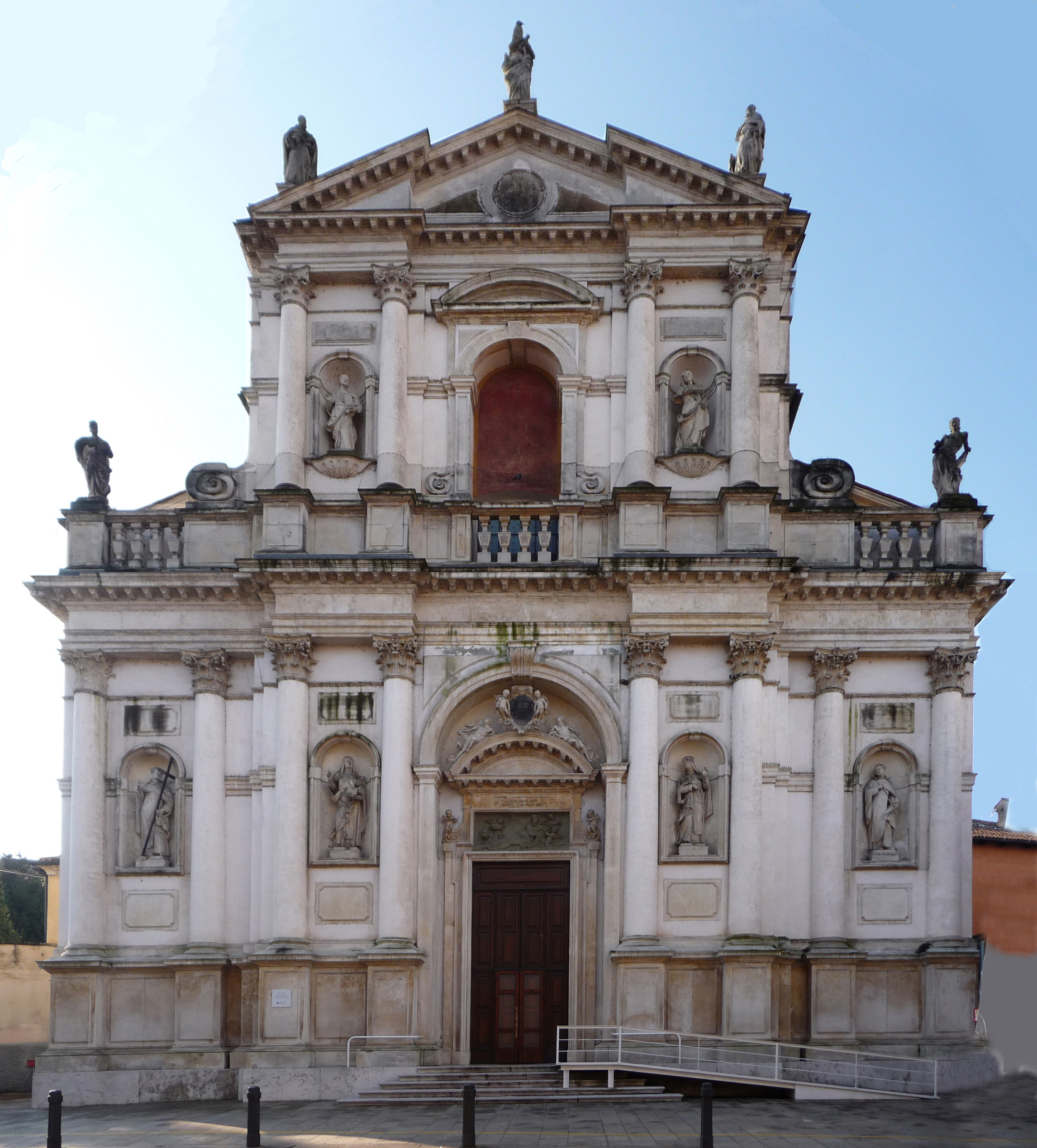 Facciata della Chiesa di San Marco in San Girolamo, Vicenza. Vista frontale. Versione rettificata e ritoccata digitalmente.